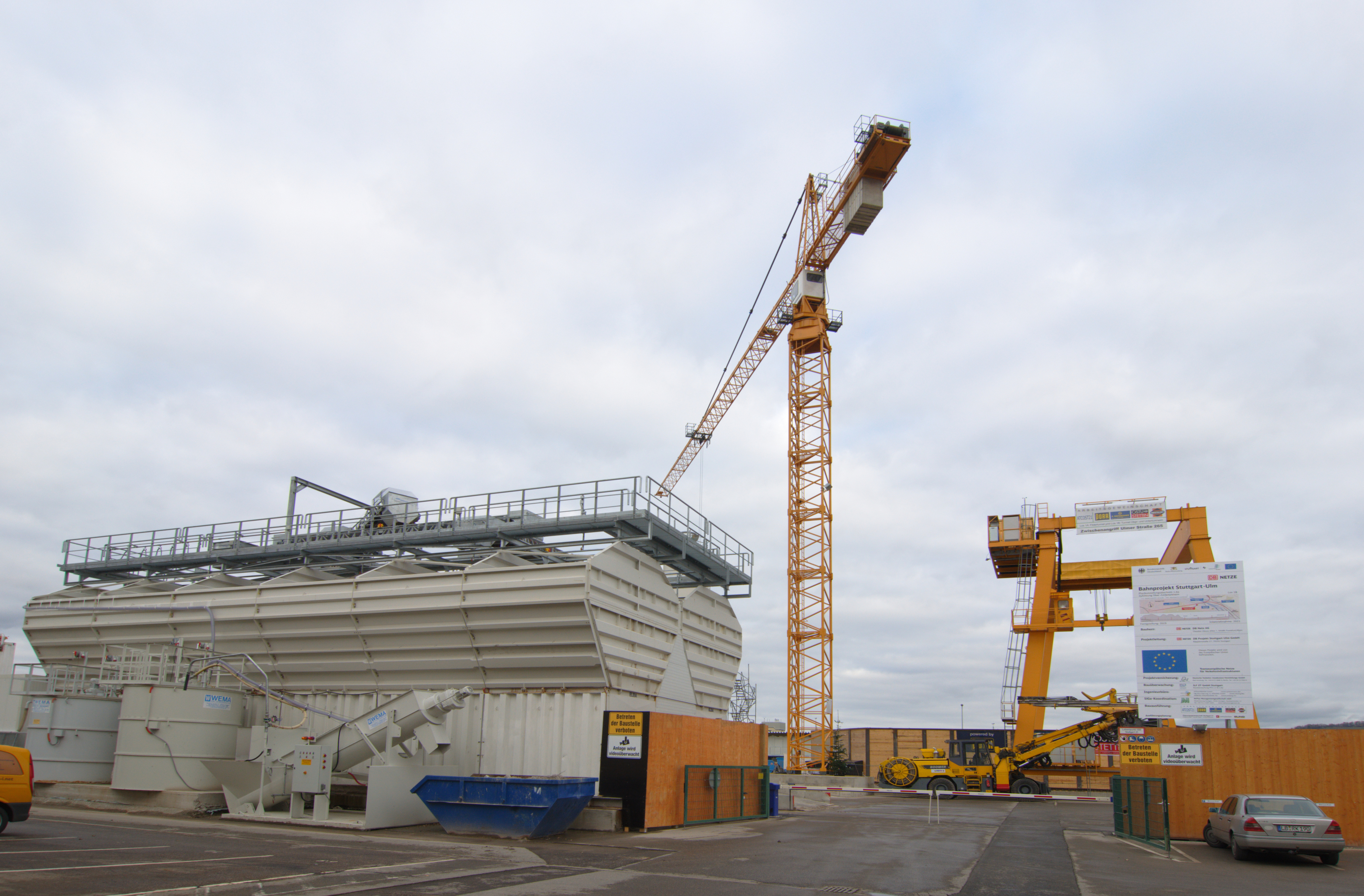 Stuttgart 21, Tunnel Obertürkheim, Zwischenangriff Ulmer Straße in Stuttgart-Wangen